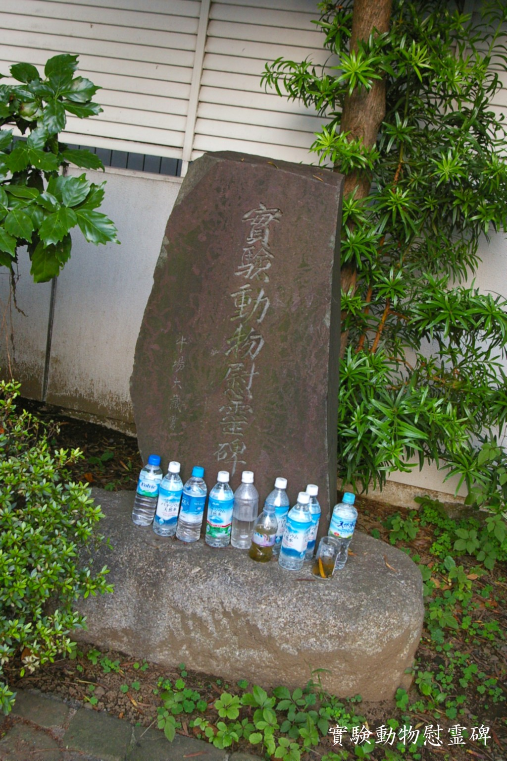 2009.5日本国内で塾生 (talk)が撮影。